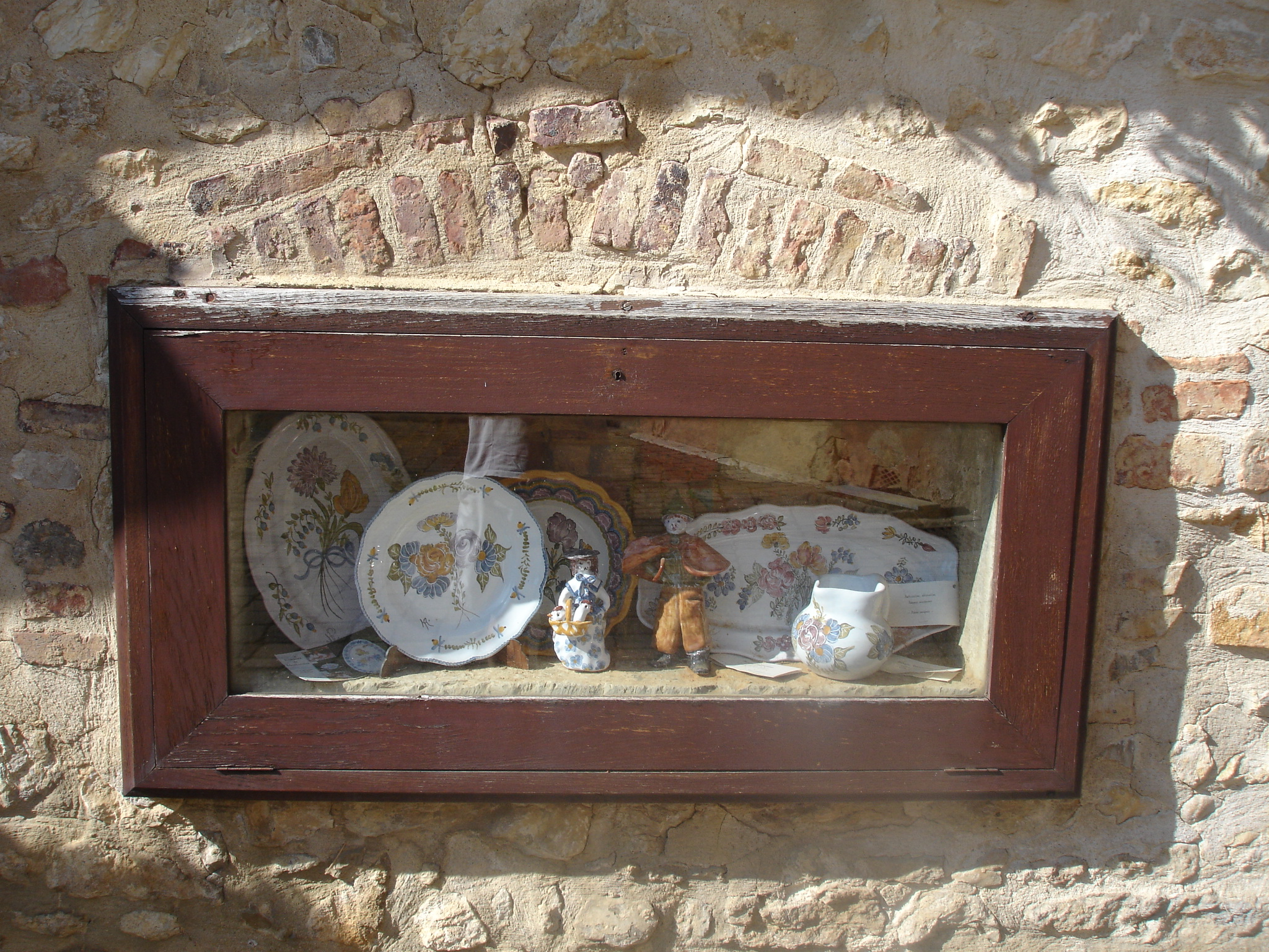 Faïences exposées en vitrine dans la rue principale de Meillonnas (Ain)